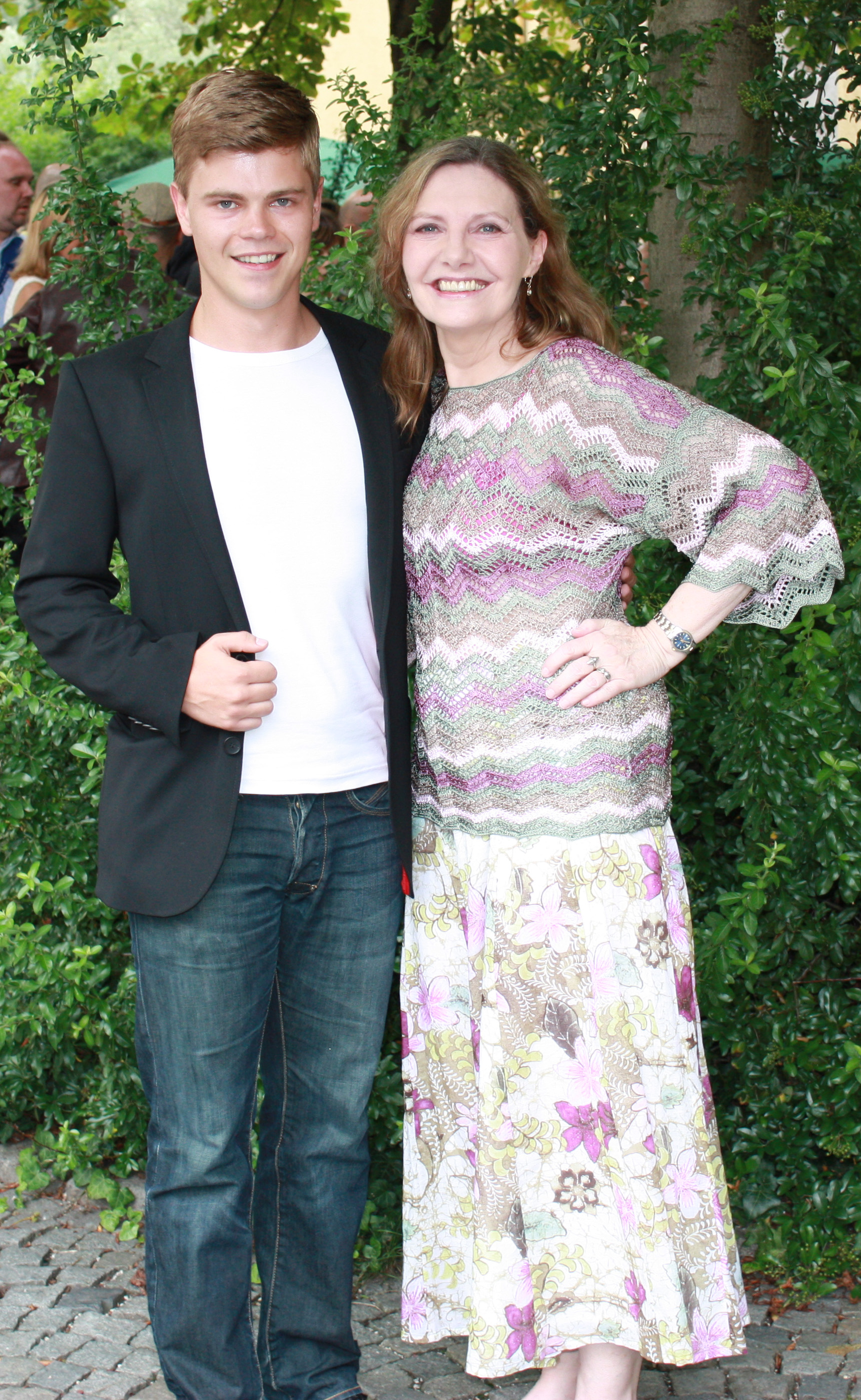 BERGBLUT-Regisseur Philipp J. Pamer & Ingrid Schölderle